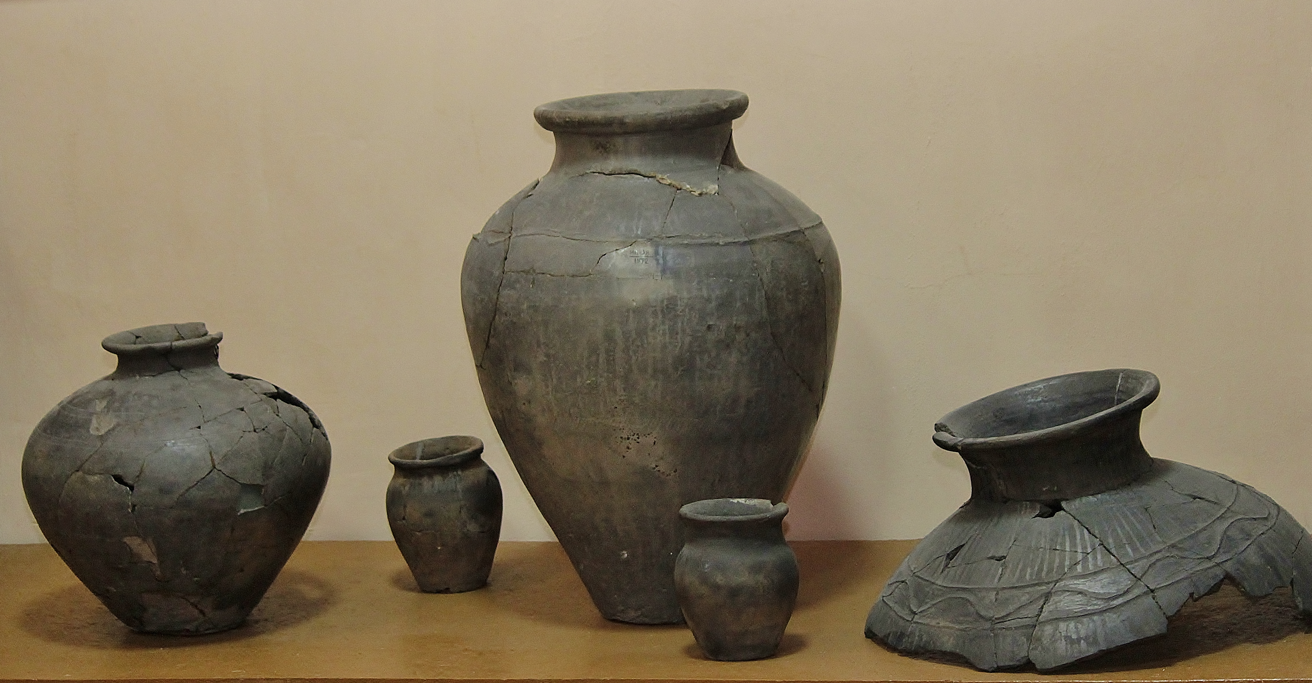 Хуннская керамика в экспозиции Кяхтинского краеведческого музея имени академика Обручева. Бурятия